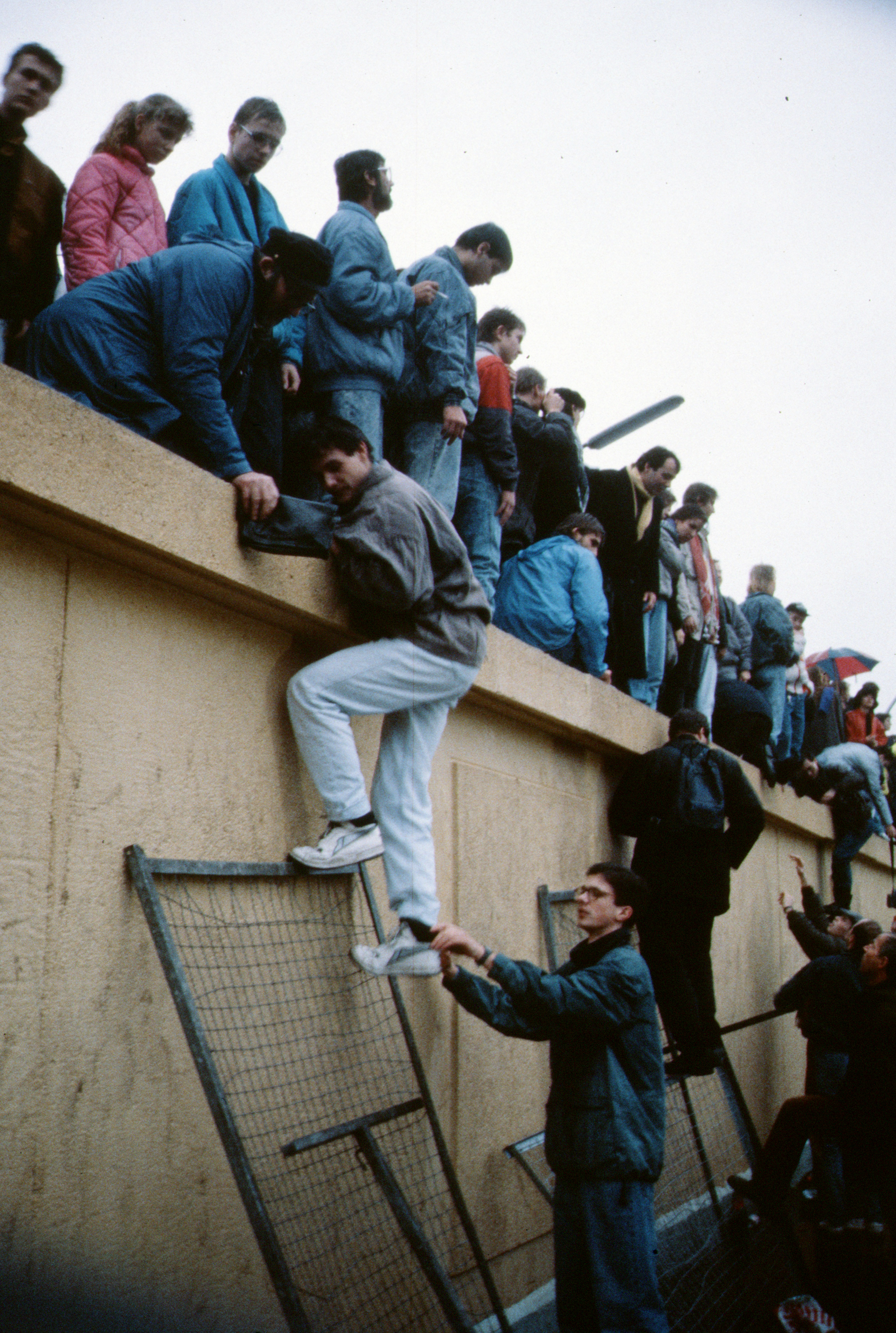 Berlin 1989, Fall der Mauer, Chute du mur